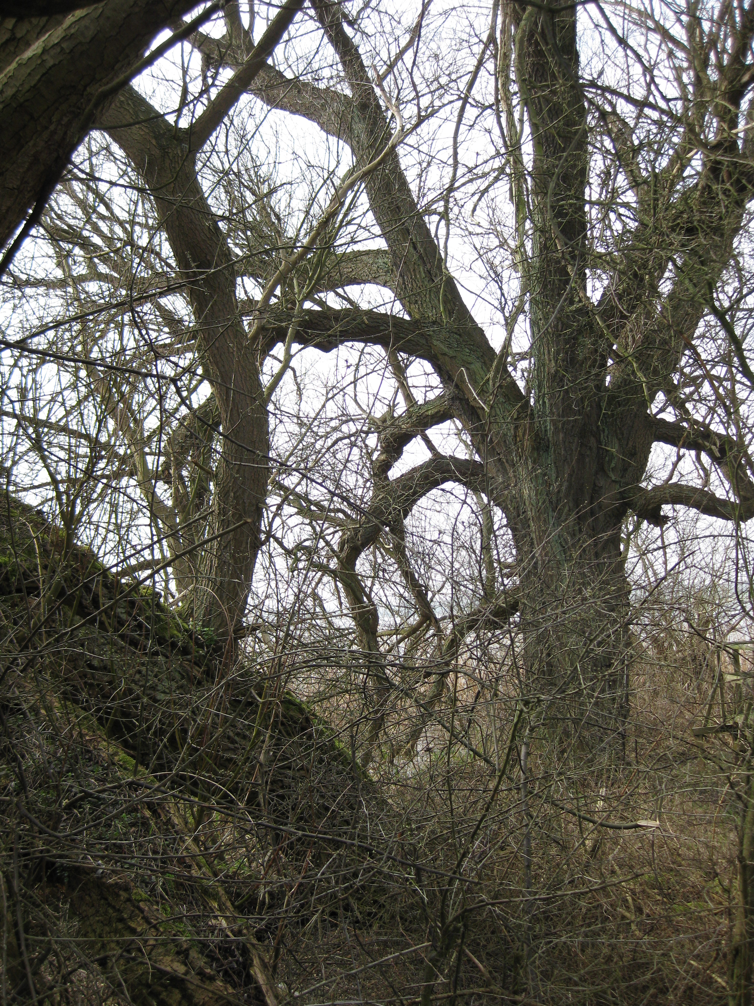 Uferzone des Röggeliner Sees beim Aussichtsturm Klocksdorf